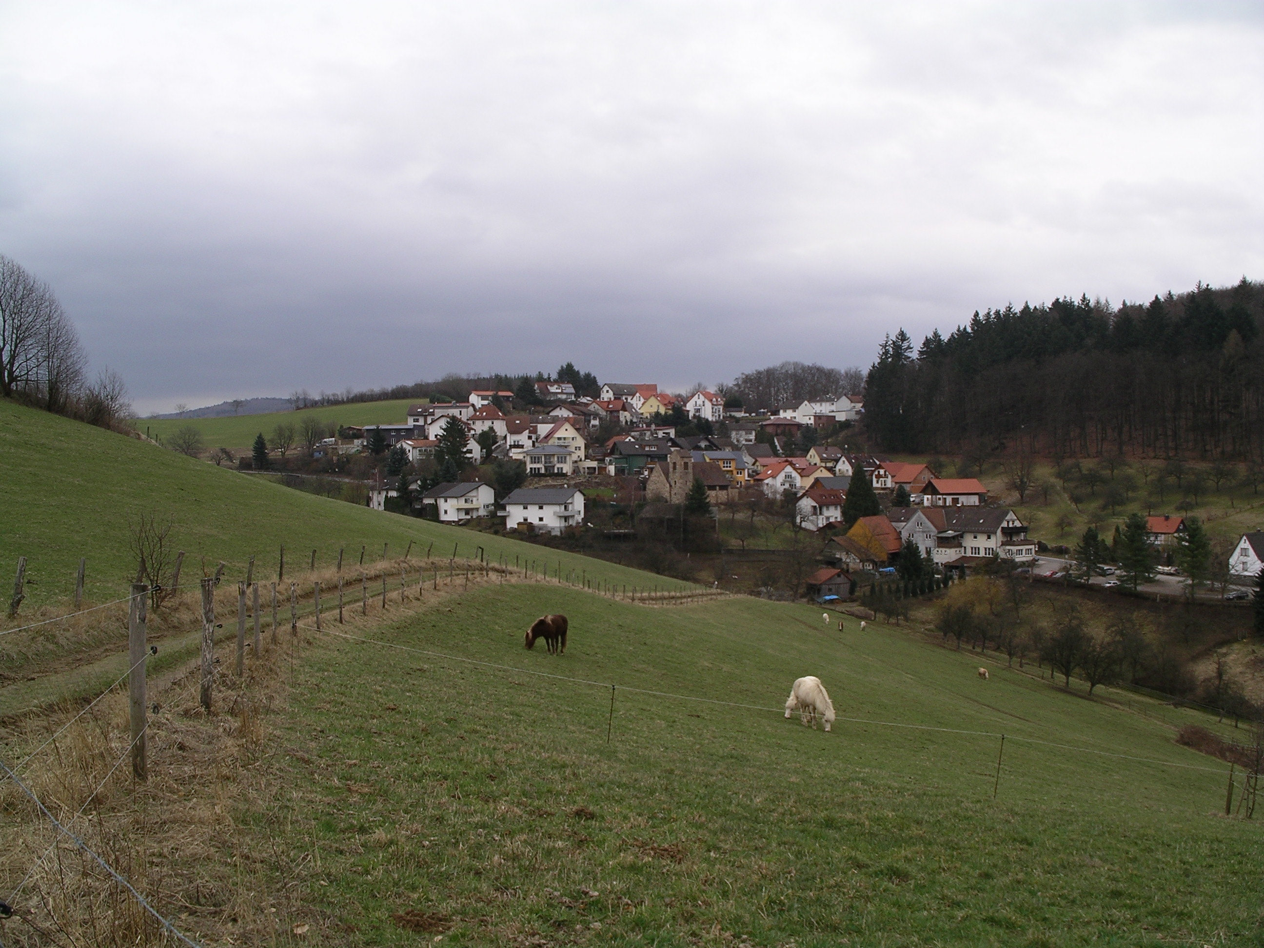 Blick auf den Birkenauer Ortsteil Buchklingen